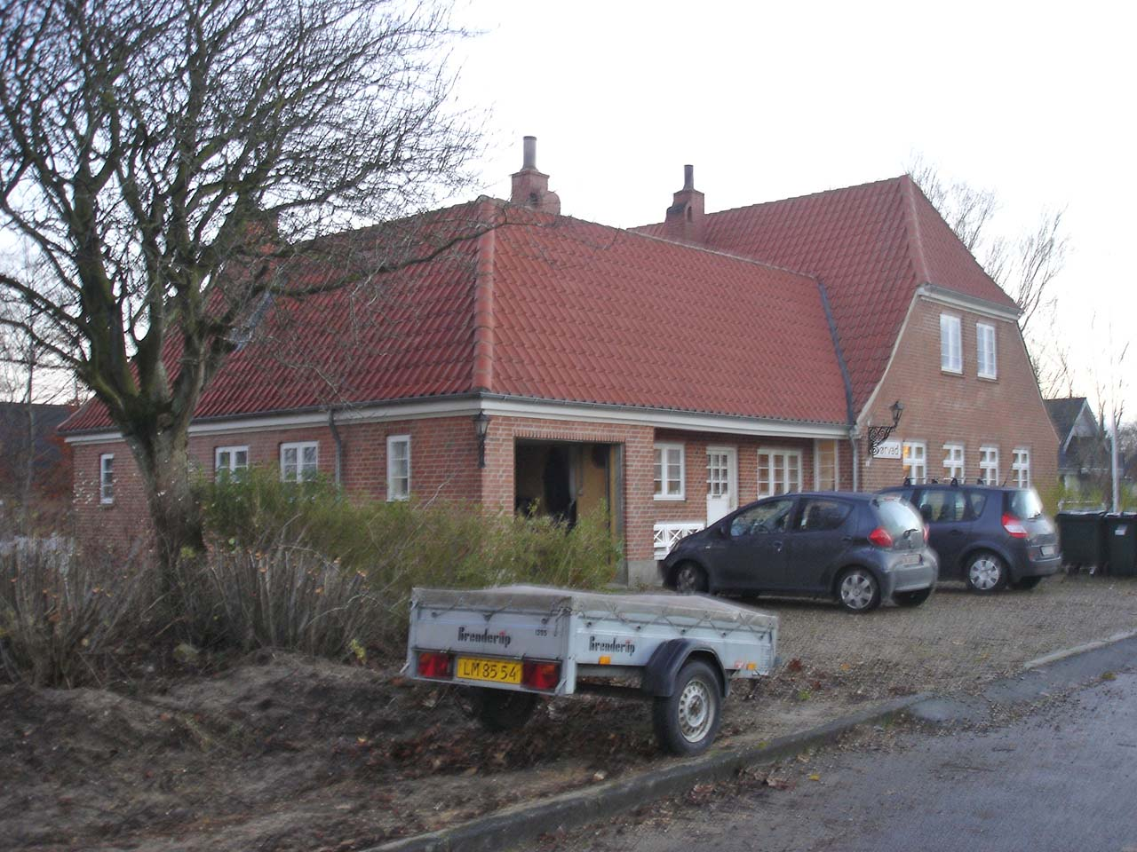 Sørvad Station fra sporsiden